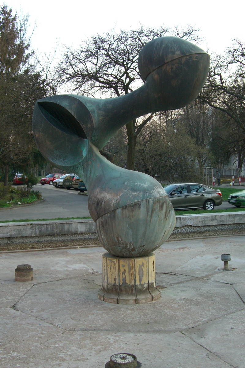 Fontana Puk Lipy - detail, Bratislava/Ruzinov/Posen